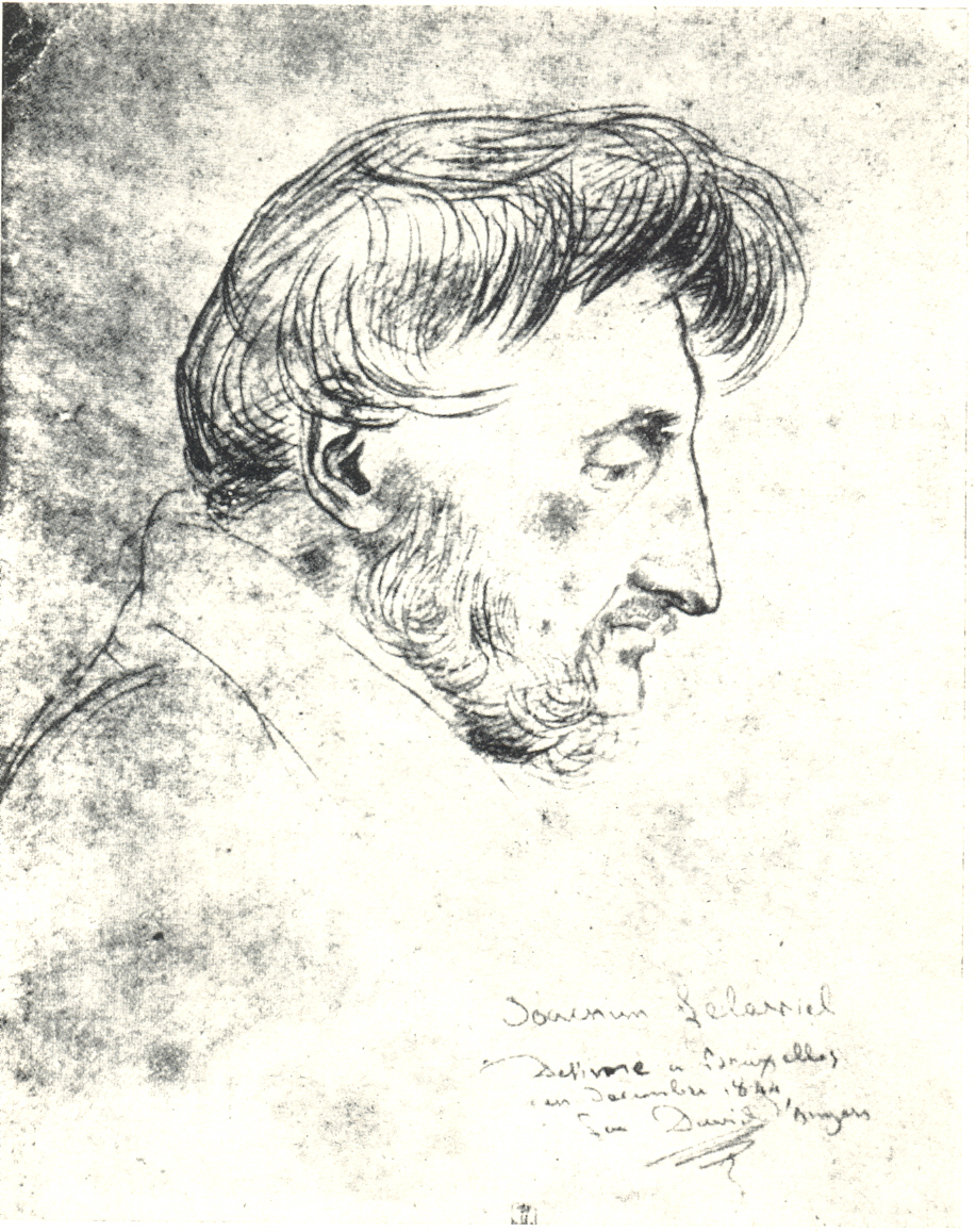 Joachim Lelewel (1786-1861)